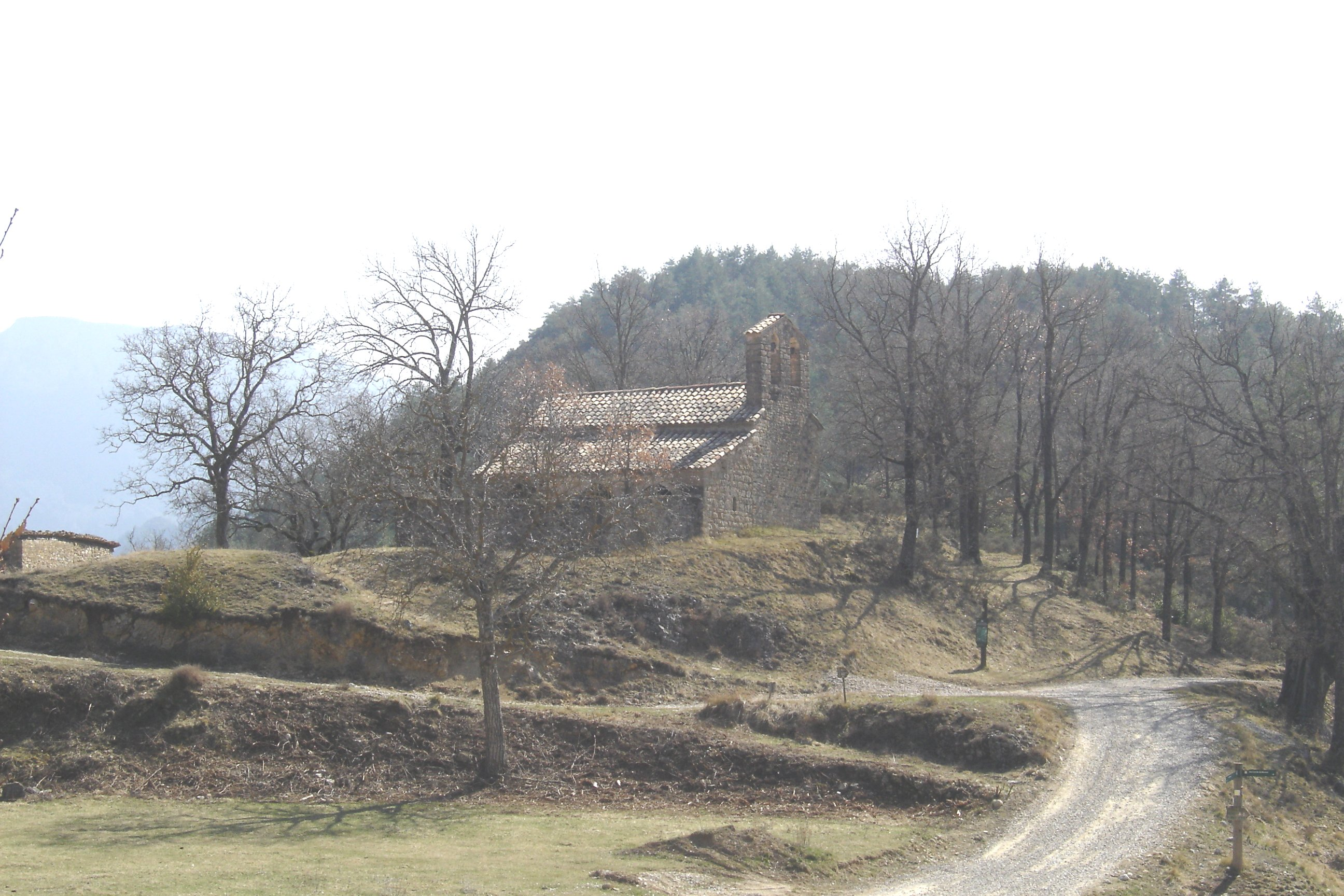 L'ermita de Sant Lleïr de Casabella, al municipi de La Coma i la Pedra, a la Vall de Lord (Solsonès) des del costat nord-oriental. Darrere l'ermita, el turó de Sant Lleïr.